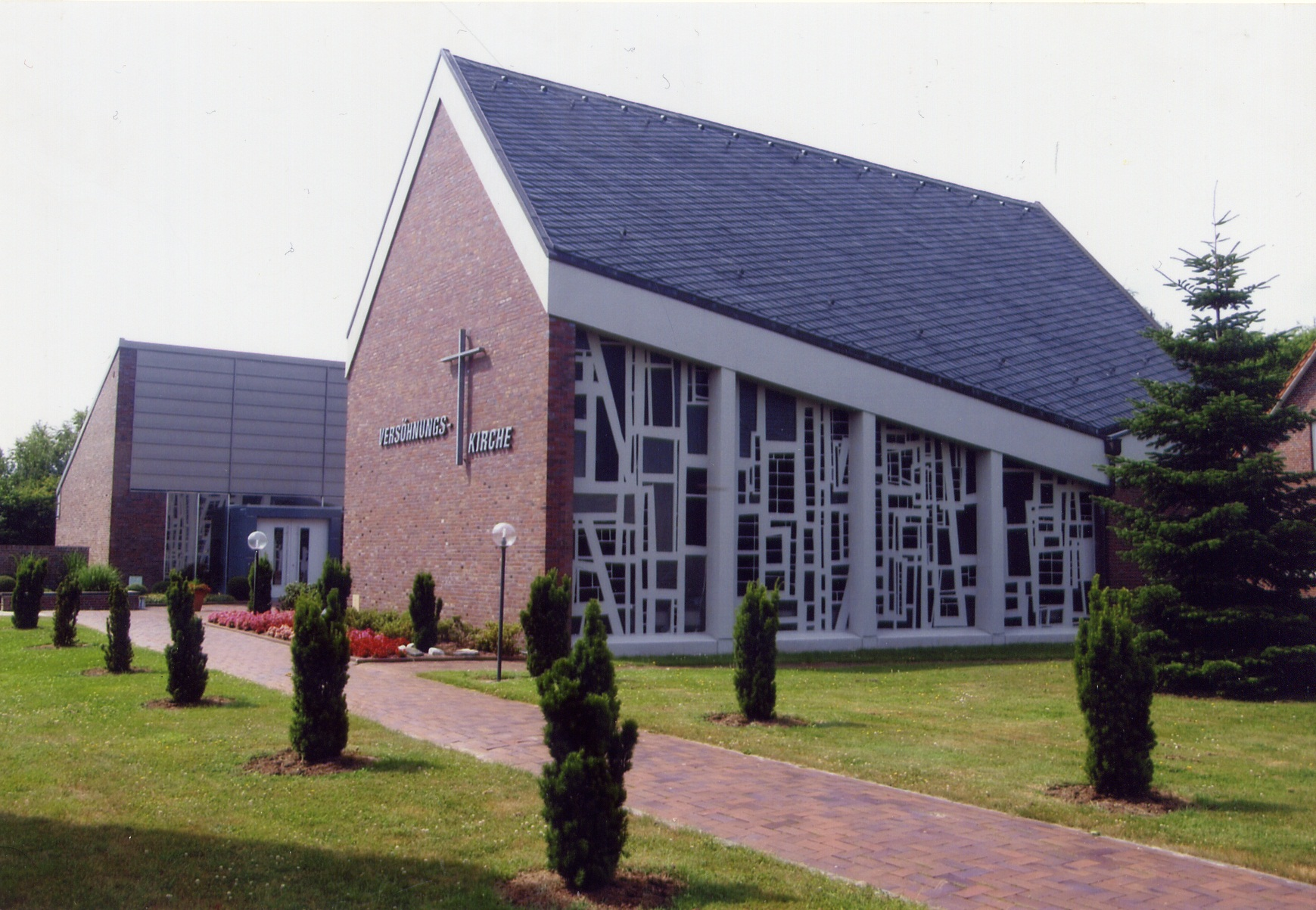 Versöhnungskirche Hinrichsfehn im Jahr 2010